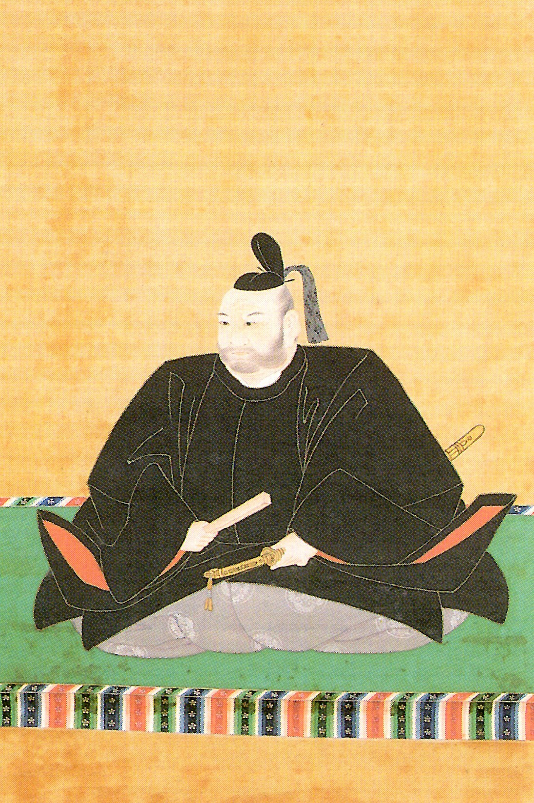 毛利秀就の肖像。